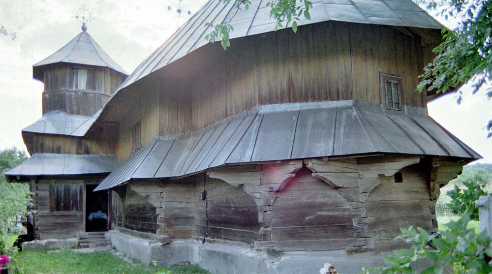 Biserica de lemn din Corjăuţi, intrarea pe sub clopotniţă, pe latura de sud a bisericii.